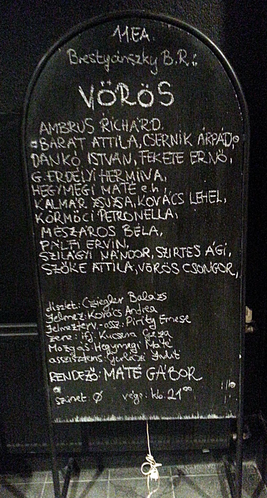 A Vörös című dokumentumdráma színlapja. Budapesti Katona József Színház - Kamra.